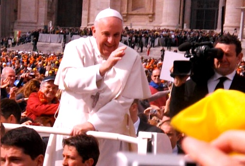 El papa Francisco (Jorge Bergoglio) recorre la plaza de San Pedro en el Vaticano durante la Audiencia General del día 19 de marzo de 2014, con motivo de la festividad cristiana de San José